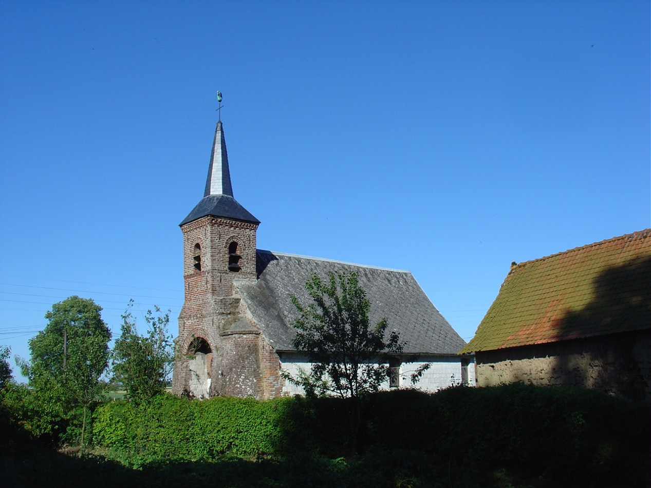 Église de Neuville-au-Cornet